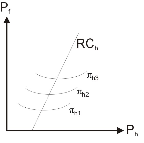 Krzywa reakcji Kraju Bertrand